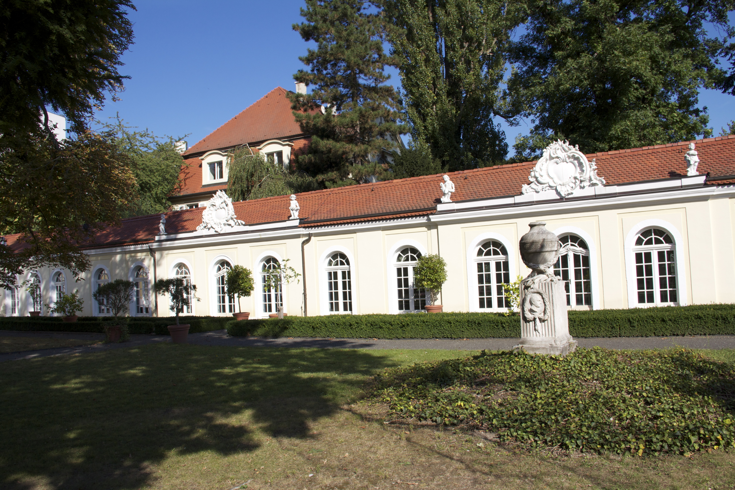 Nebengebäude auf der rechten Parkseite des Gohliser Schlösschens